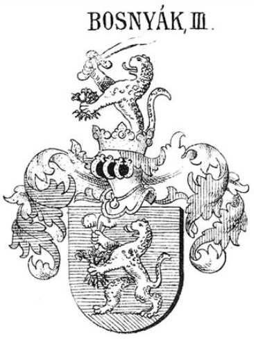 A felsőpataki Bosnyák család cimere